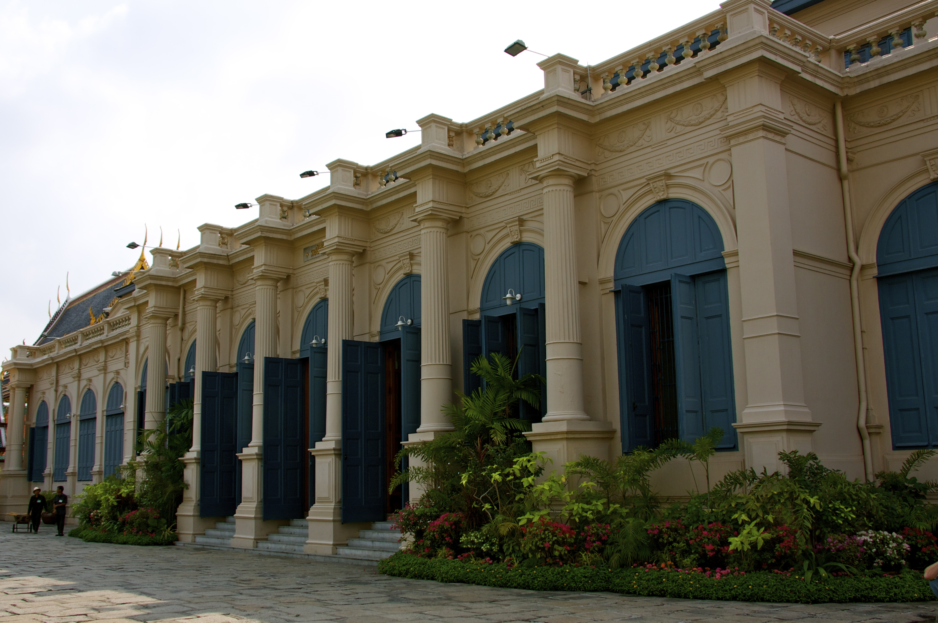 Sala Sahathai Samakhom Hall, Grand Palace, Bangkok, Thailand